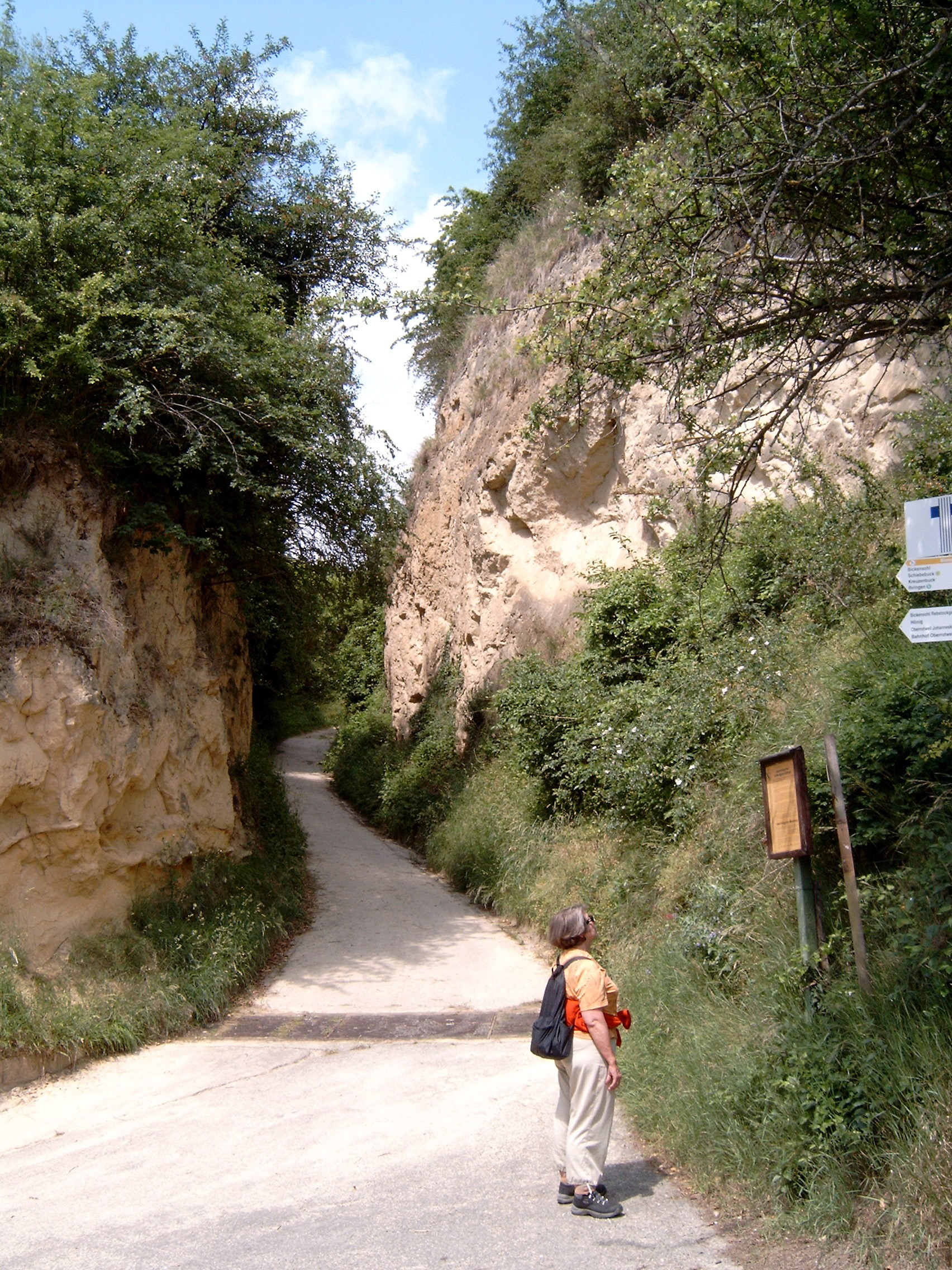 Lösshohlweg Eichberggasse in Vogtsburg-Bickensohl im Kaiserstuhl